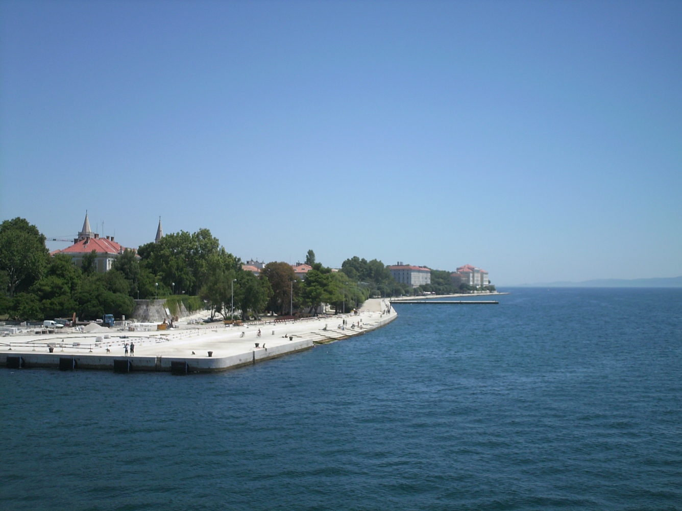 11.07.2007. _ Zadar